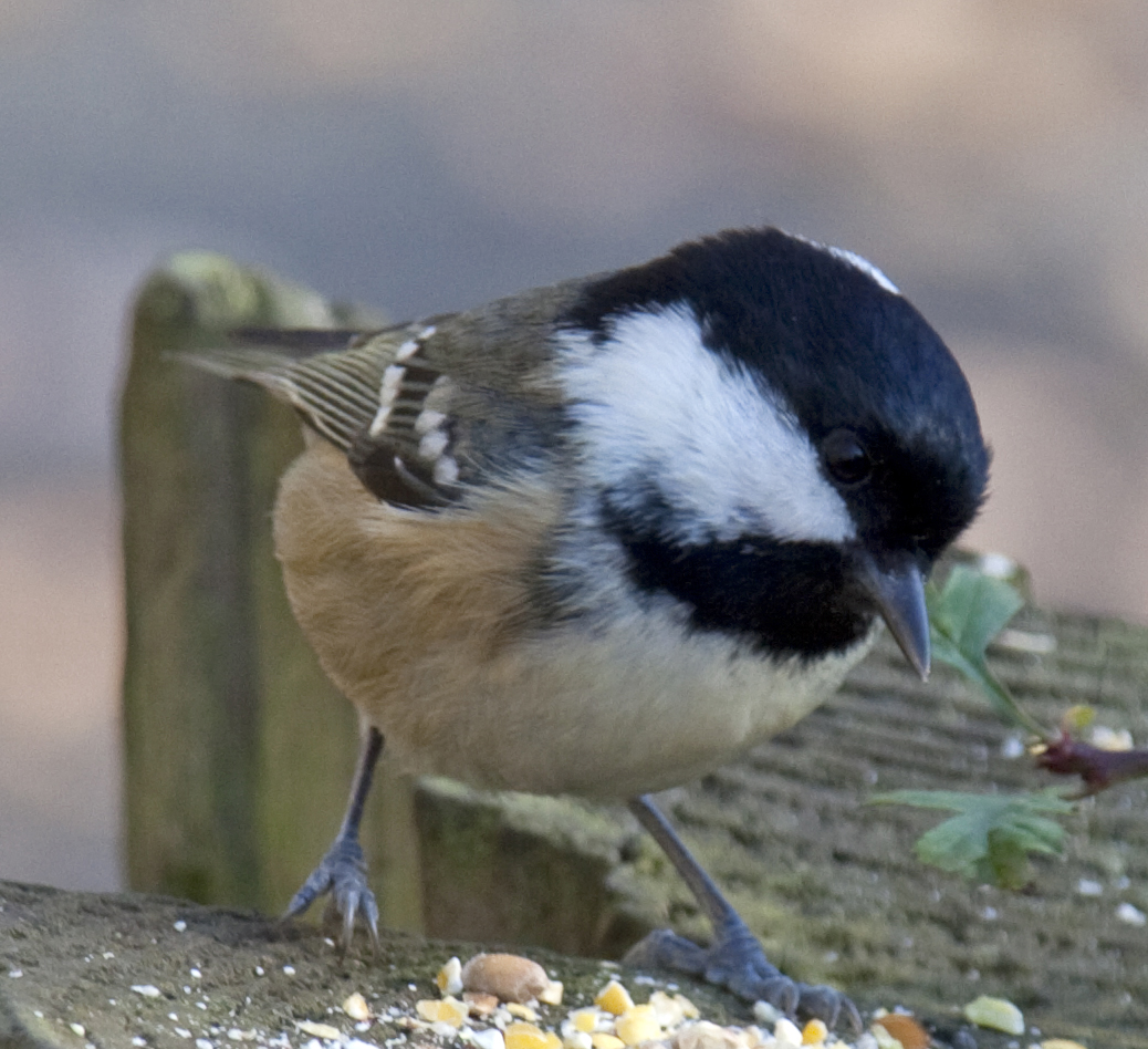 Periparus ater